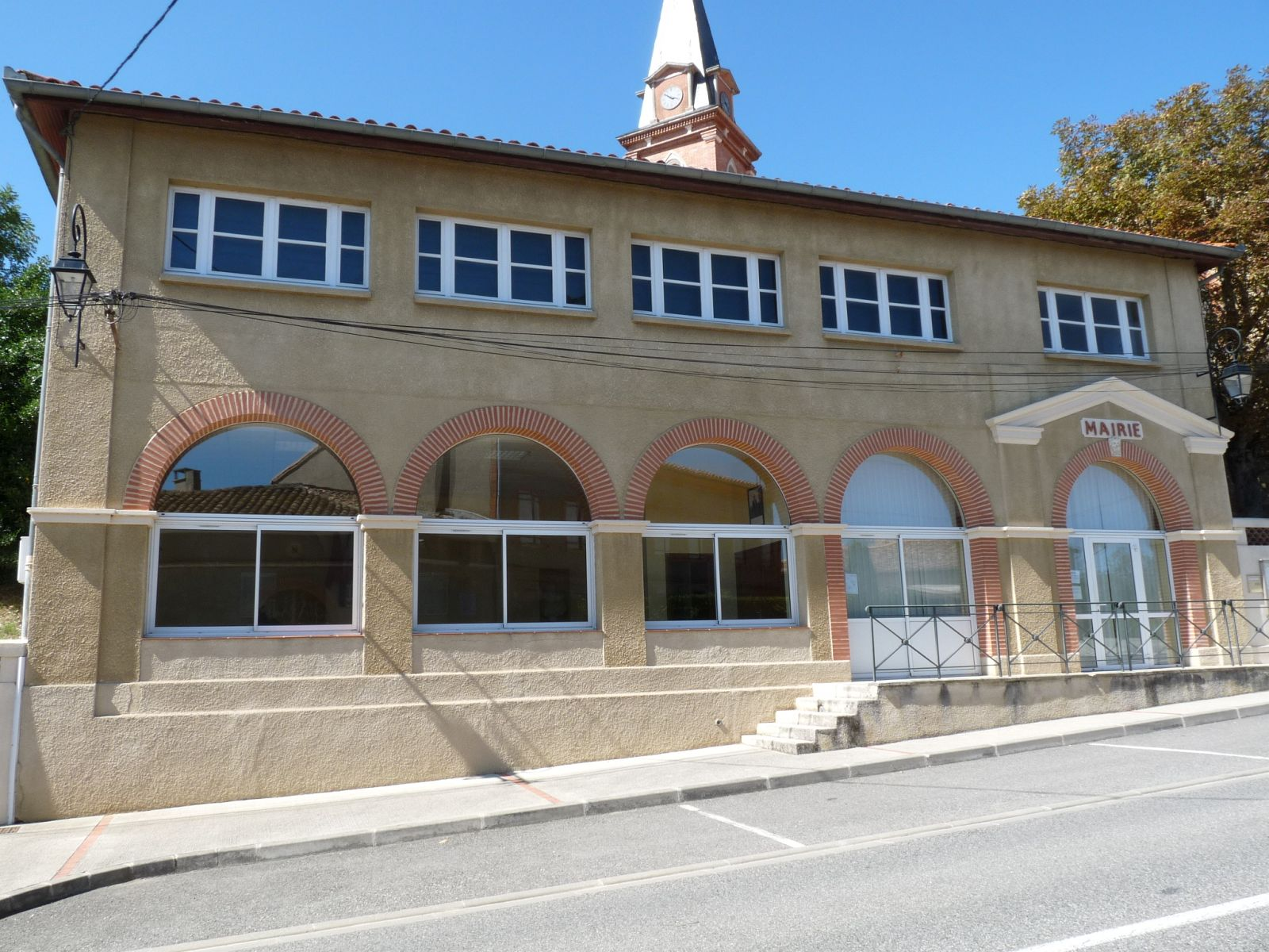 Mairie de Cessales, Haute-Garonne, France